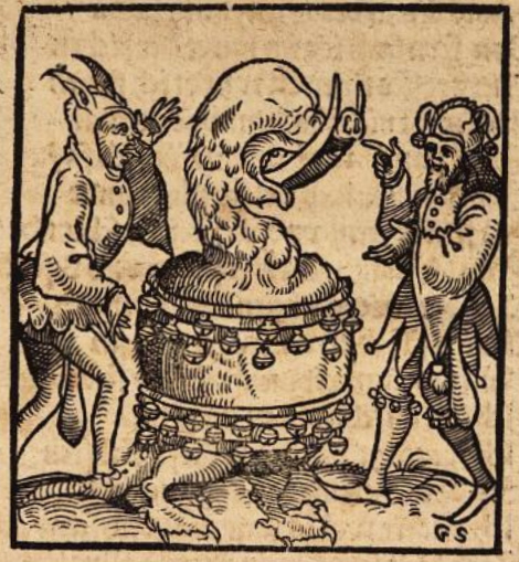 Titelbild zu Hans Sachs: Ein Gespräch mit der Fastnacht, von ihrer Eigenschaft, Merckel, 1555